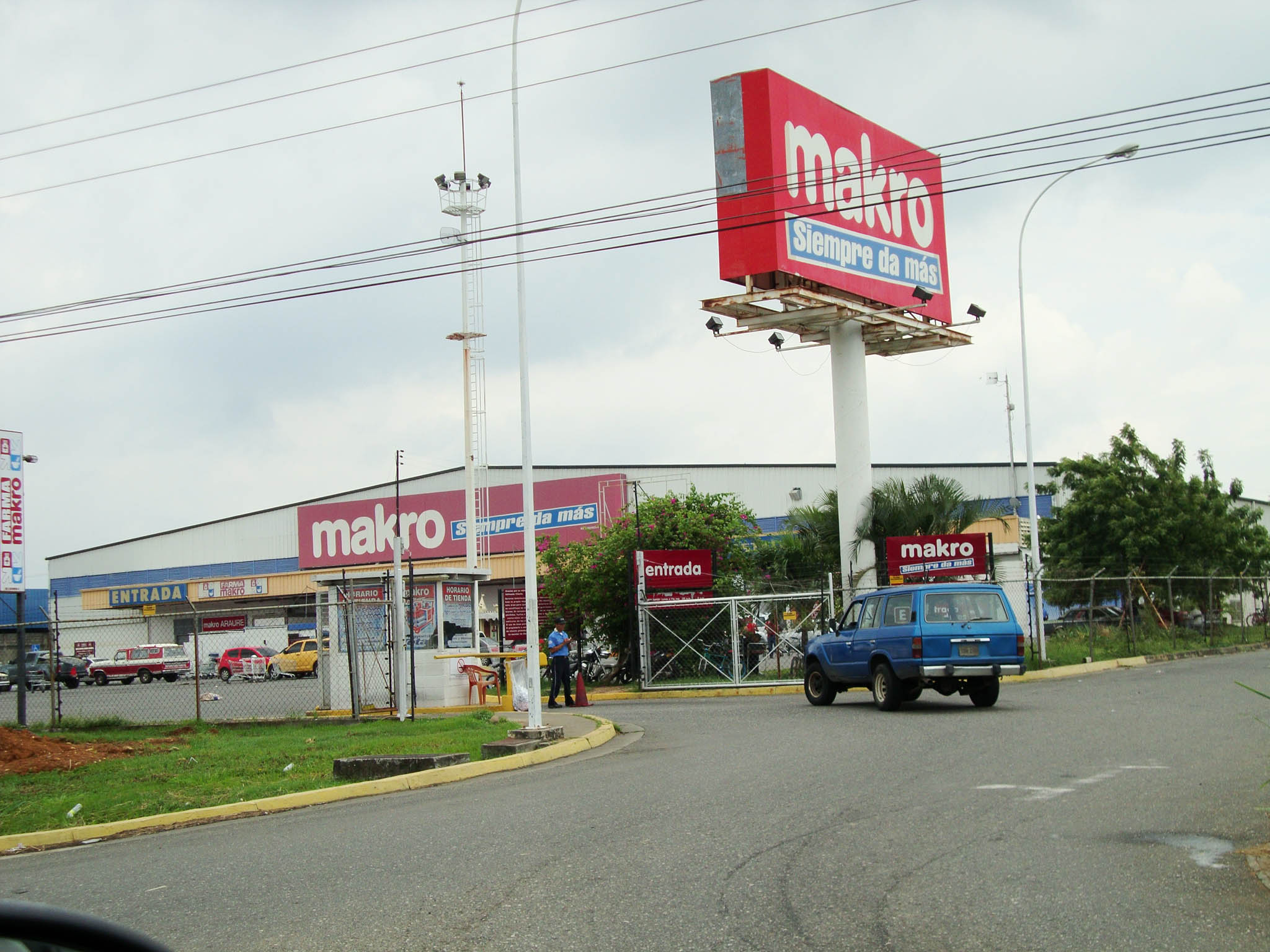 Araure, Portuguesa, Venezuela